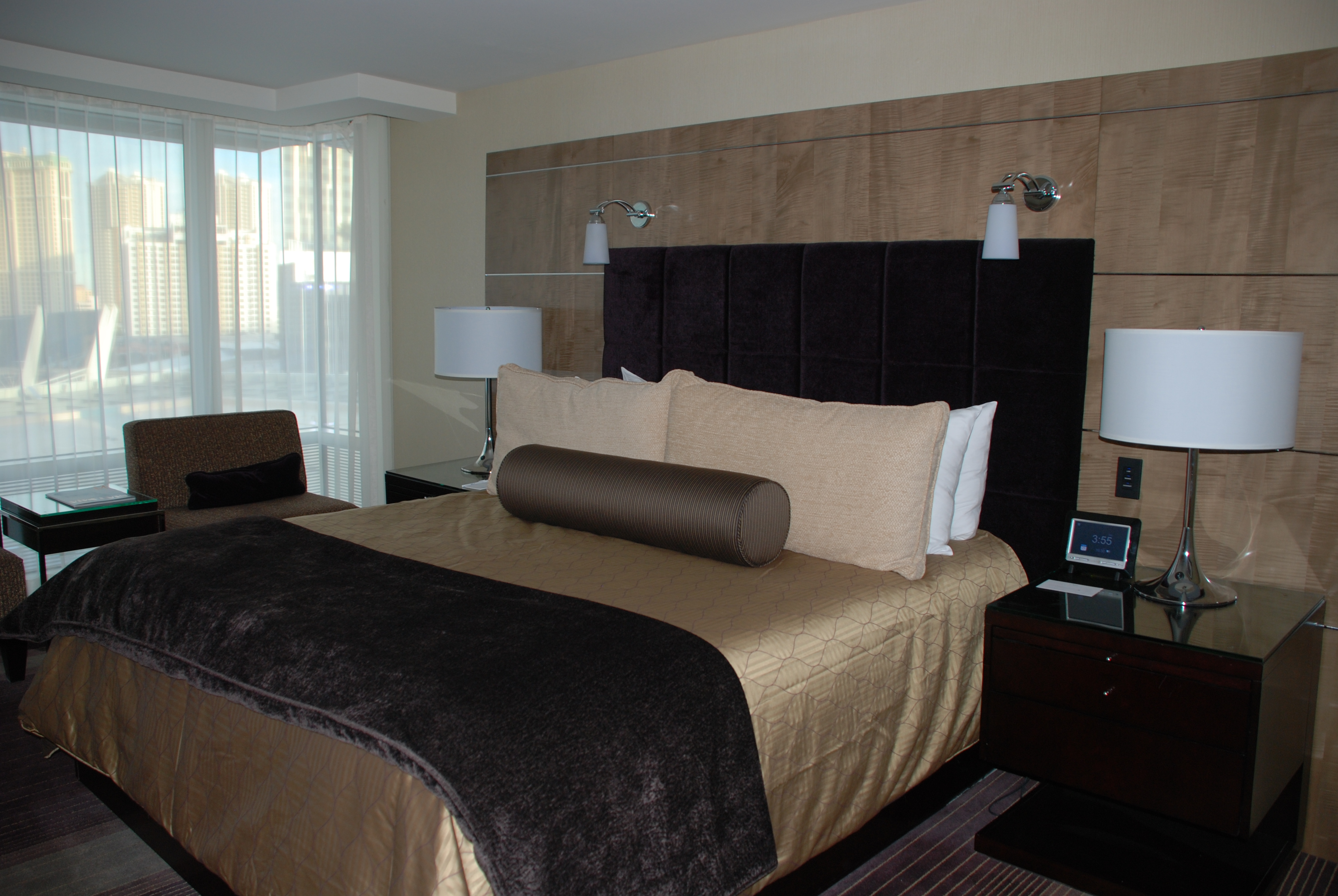 Room at Aria in Las Vegas, Nevada.